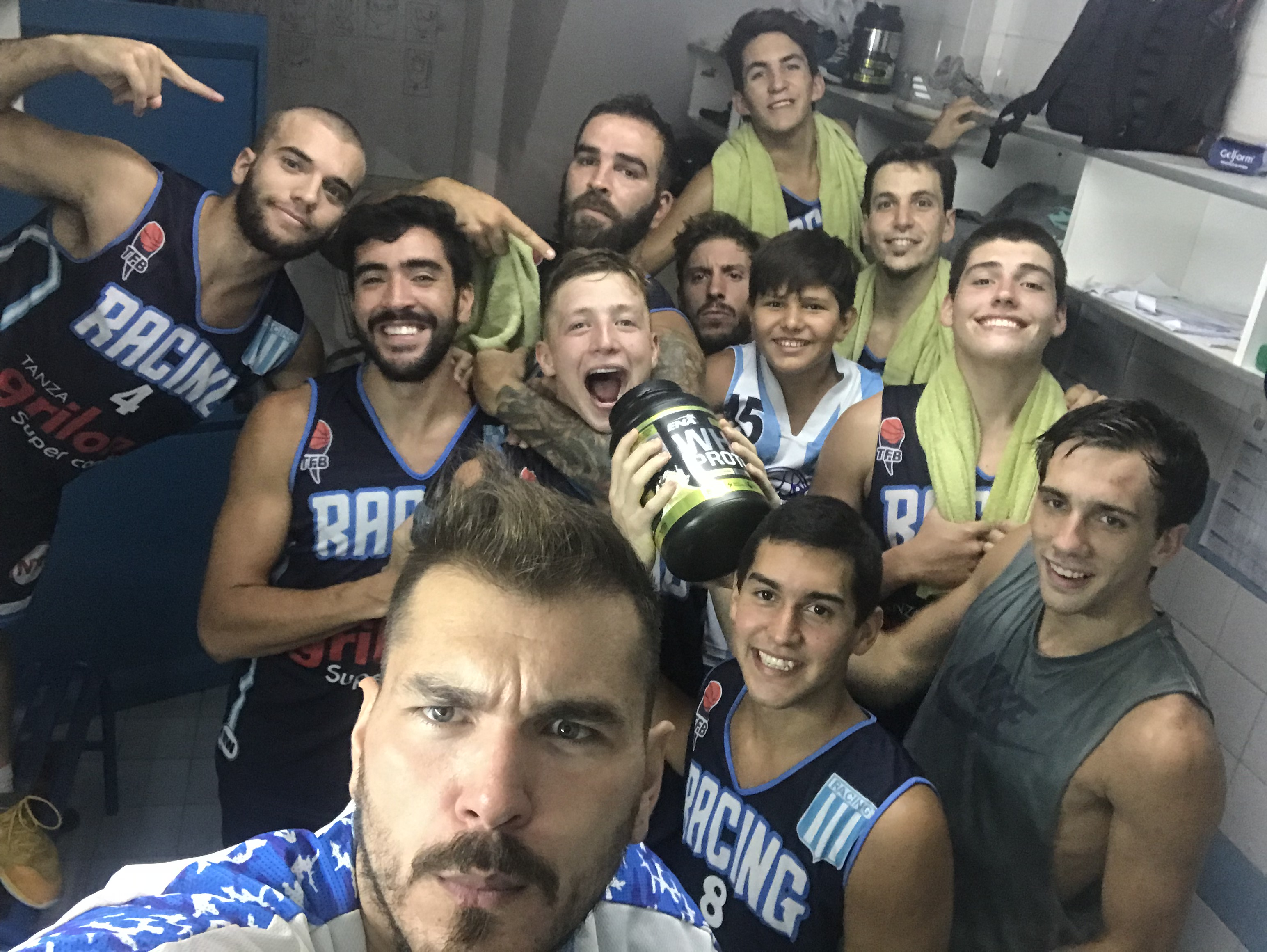 Selfie Ganadora